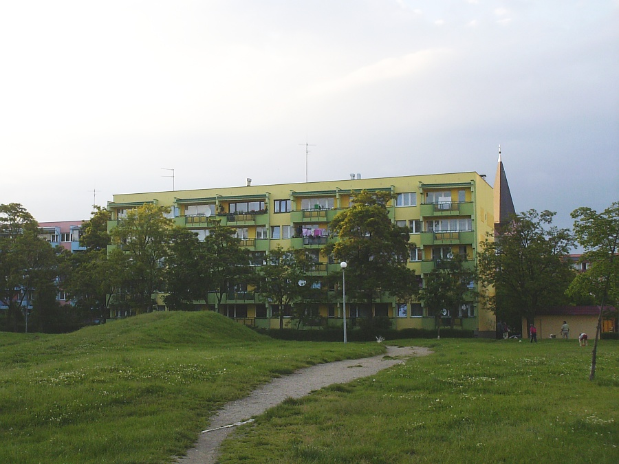 os. Kopernika w Legnicy